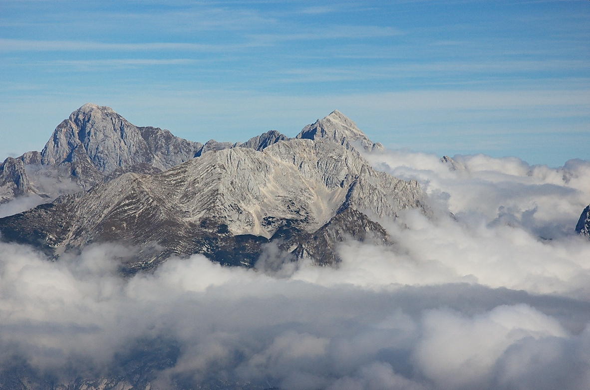 Mangart e Jalovec